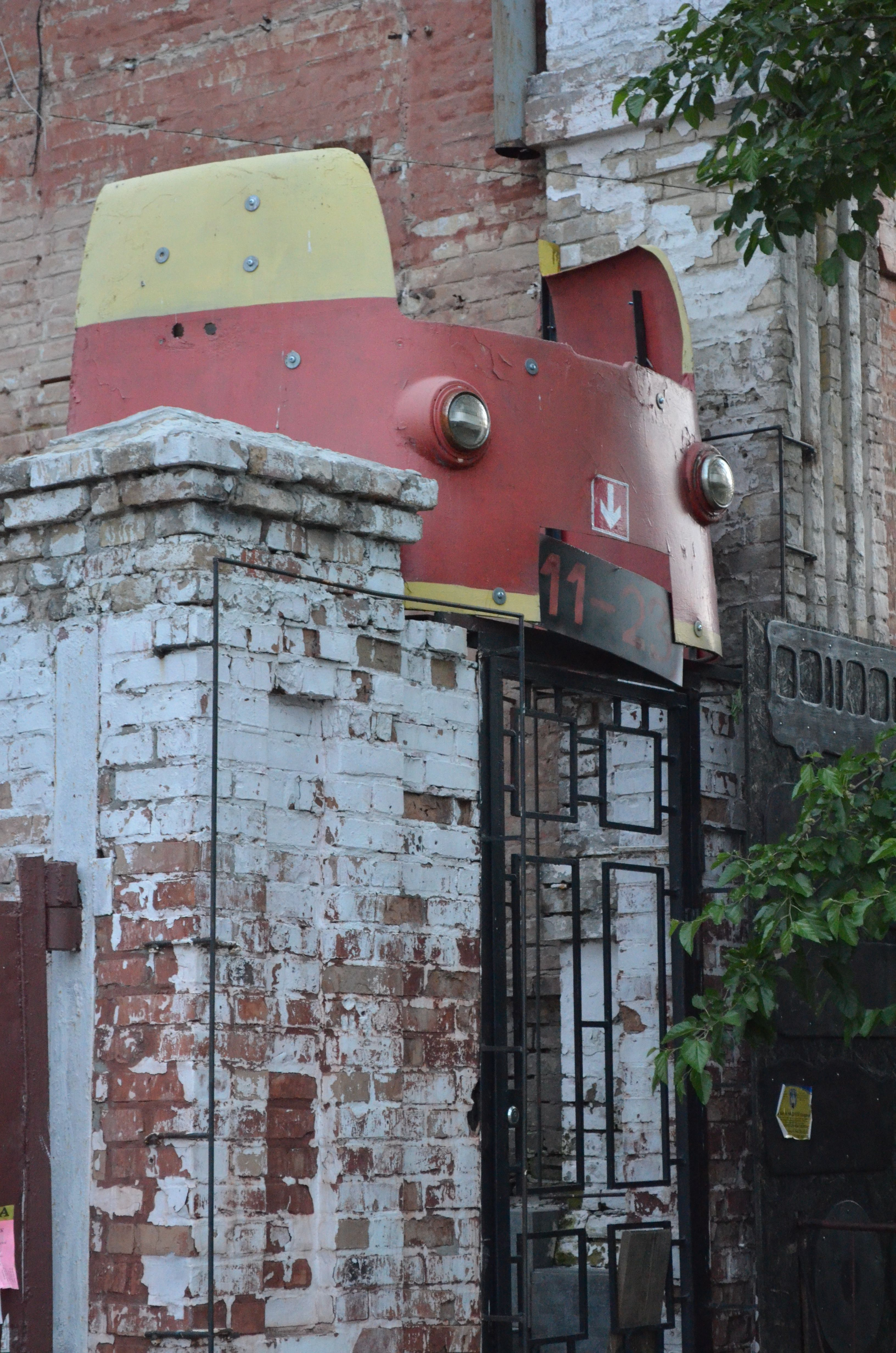 Вулиця Дегтярівська (Київ)